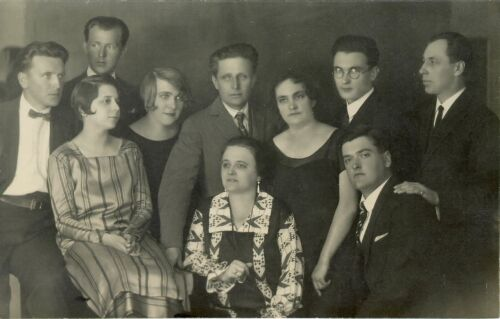 Udeleženci turneje ljubljanskega dramskega gledališča: po Sloveniji 13. VI. - 14. VII. 1925 (Lojze Drenovec, Vida Juvanova, S. Smerkolj, Rogoz, Zvonimir Rogoz, Polonica Juvanova, Cirila Medved, Ivan Cesar in Vladimir Skrbinšek)